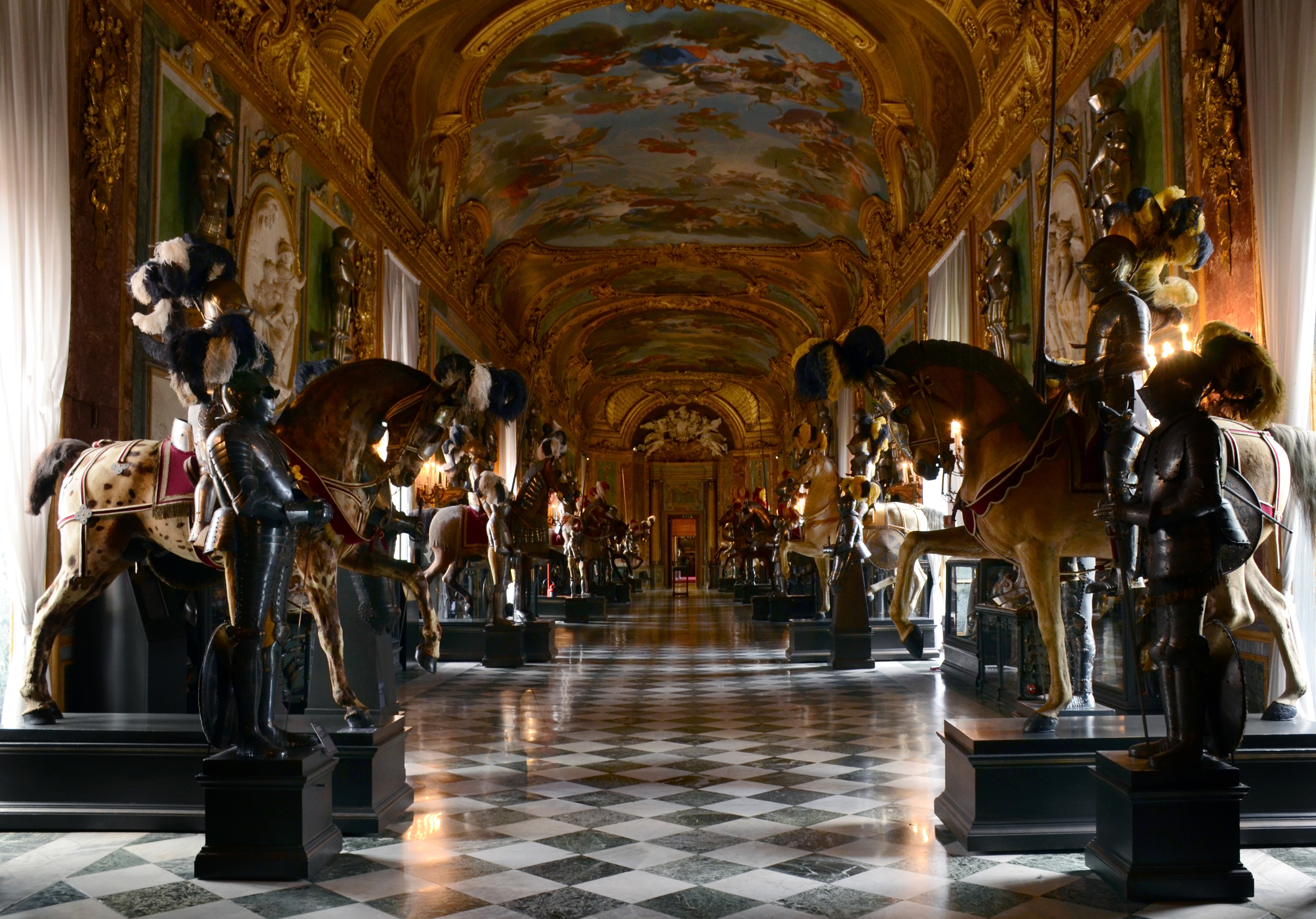 L'Armurerie Royale dans le Palais Royal de Turin.